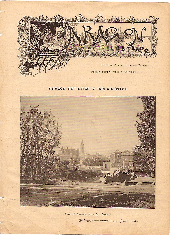 Página de la revista